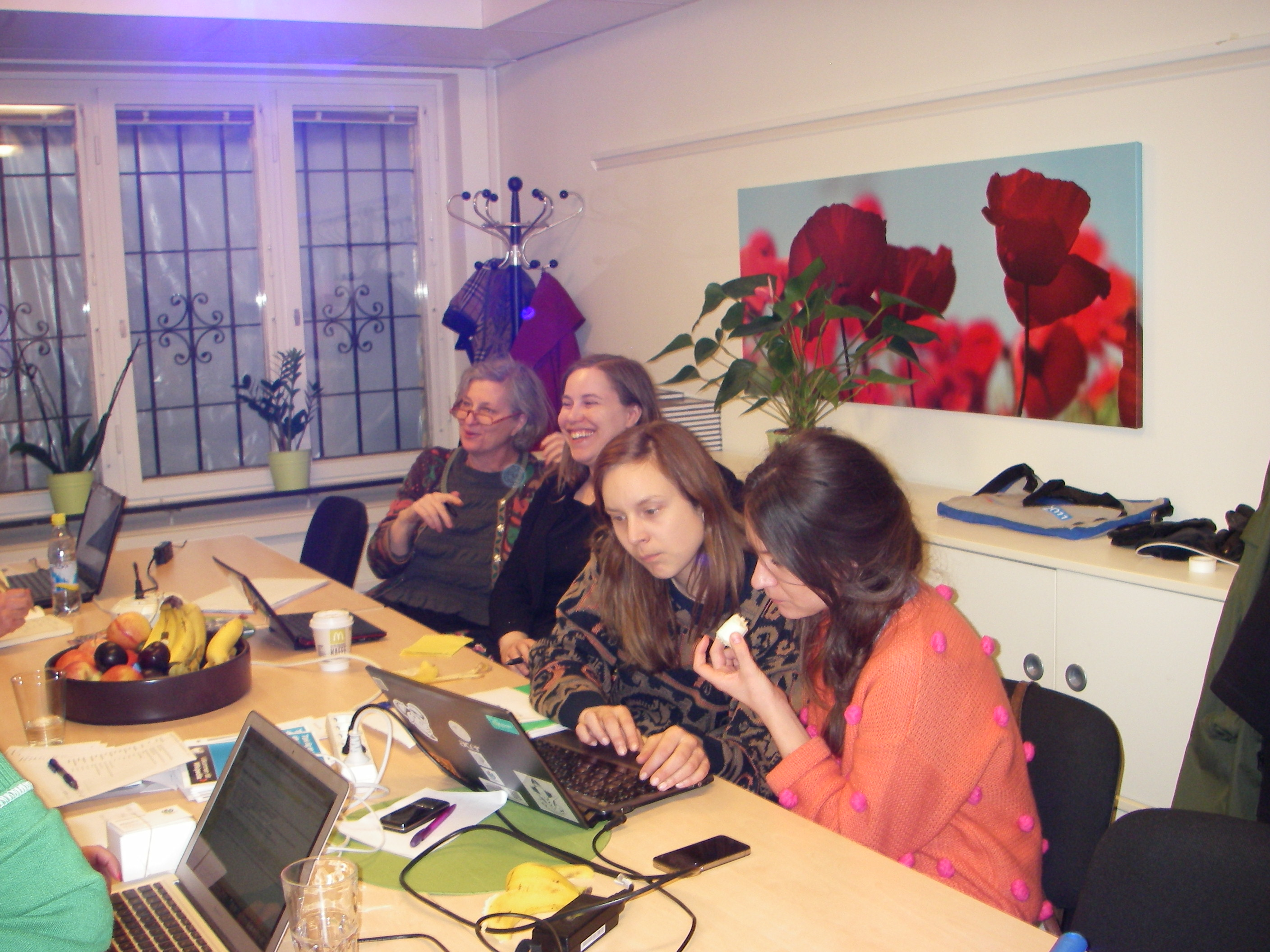 Deltagare från Wikifem/Sveriges Kvinnolobby vid en Wikipediaworkshop anordnad av Wikimedia Sverige.